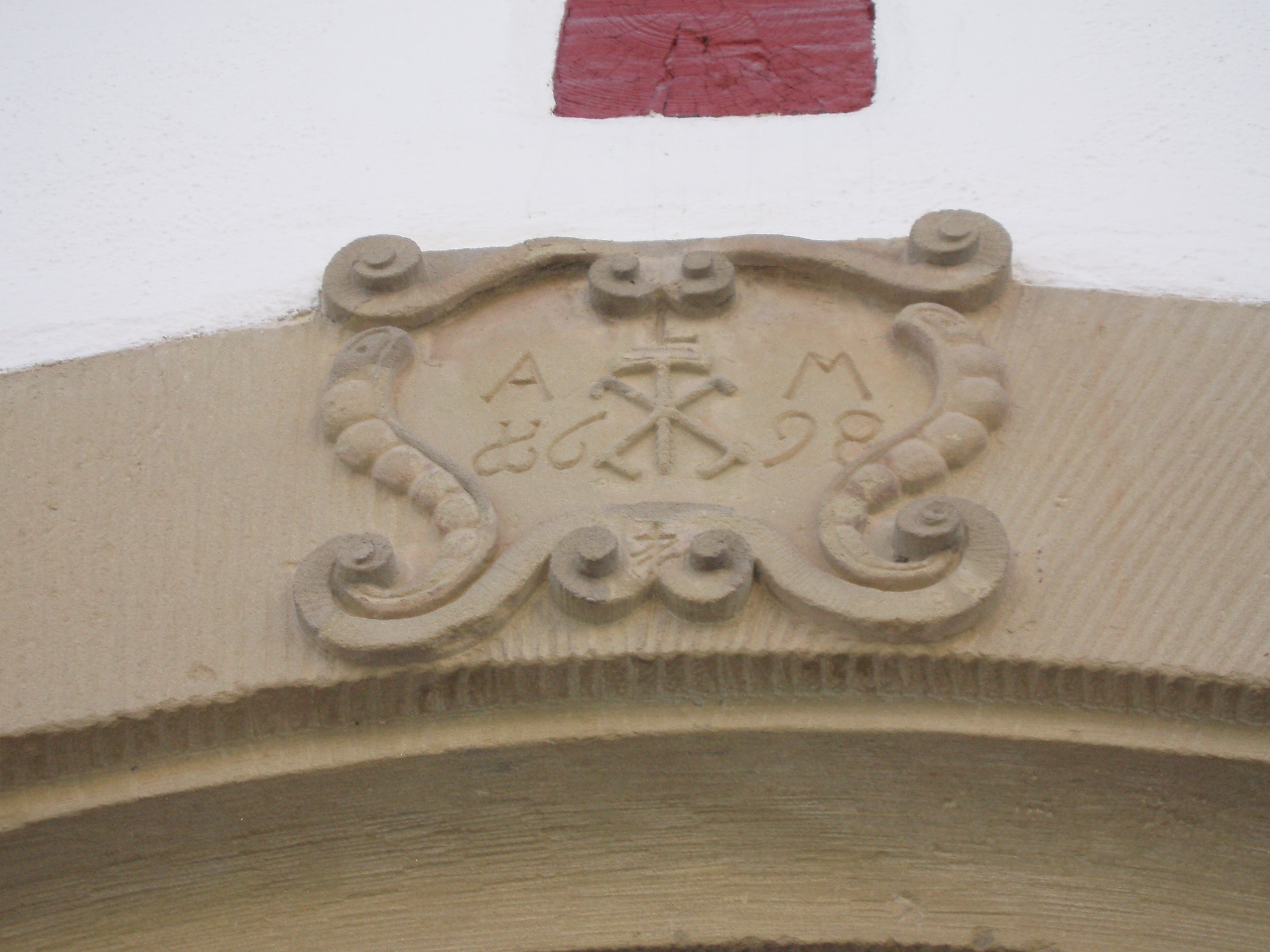 Türsturz des Museums unter der Y-Burg